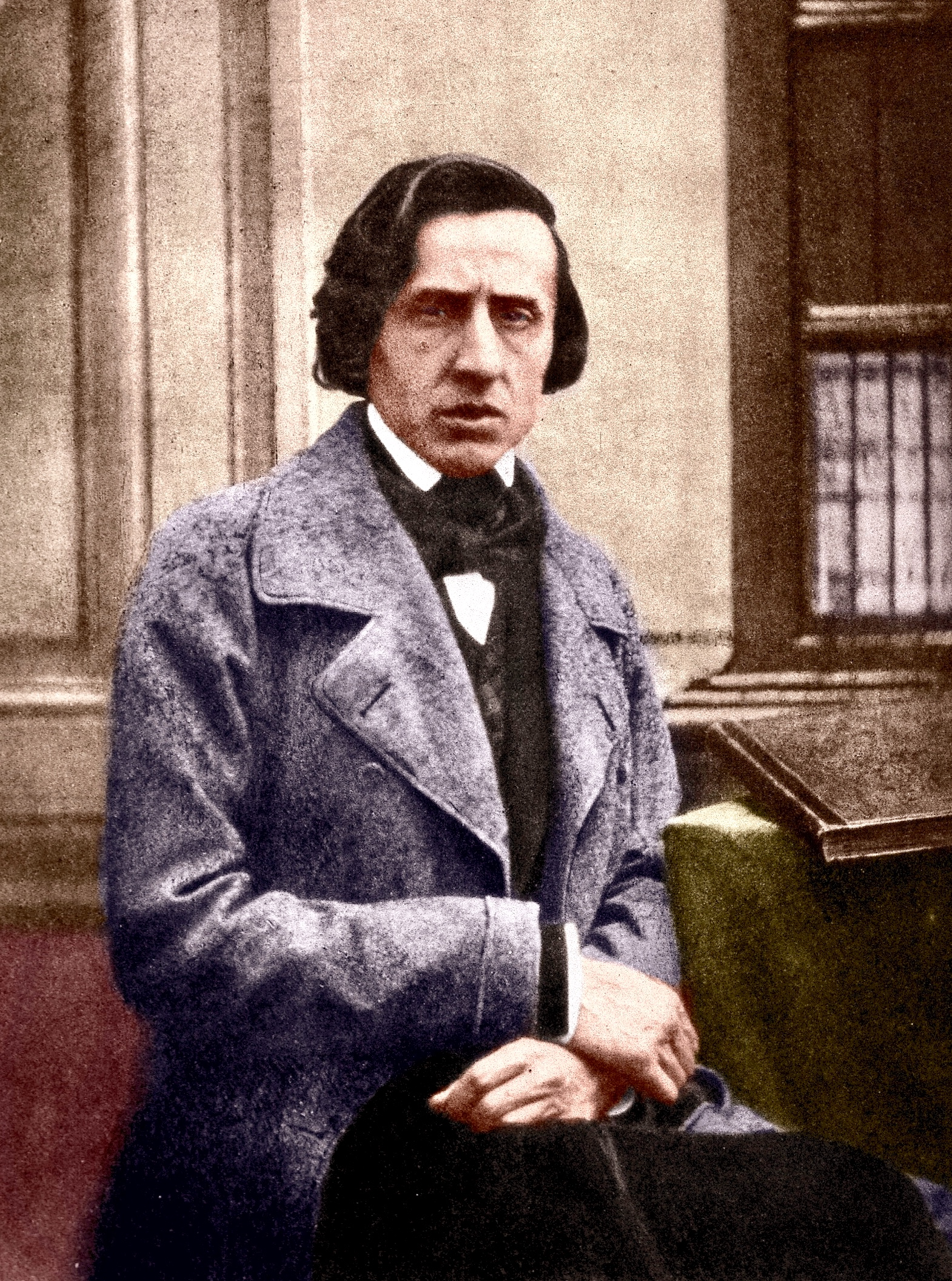 ルイ＝オーギュスト・ビソンによる晩年のショパン